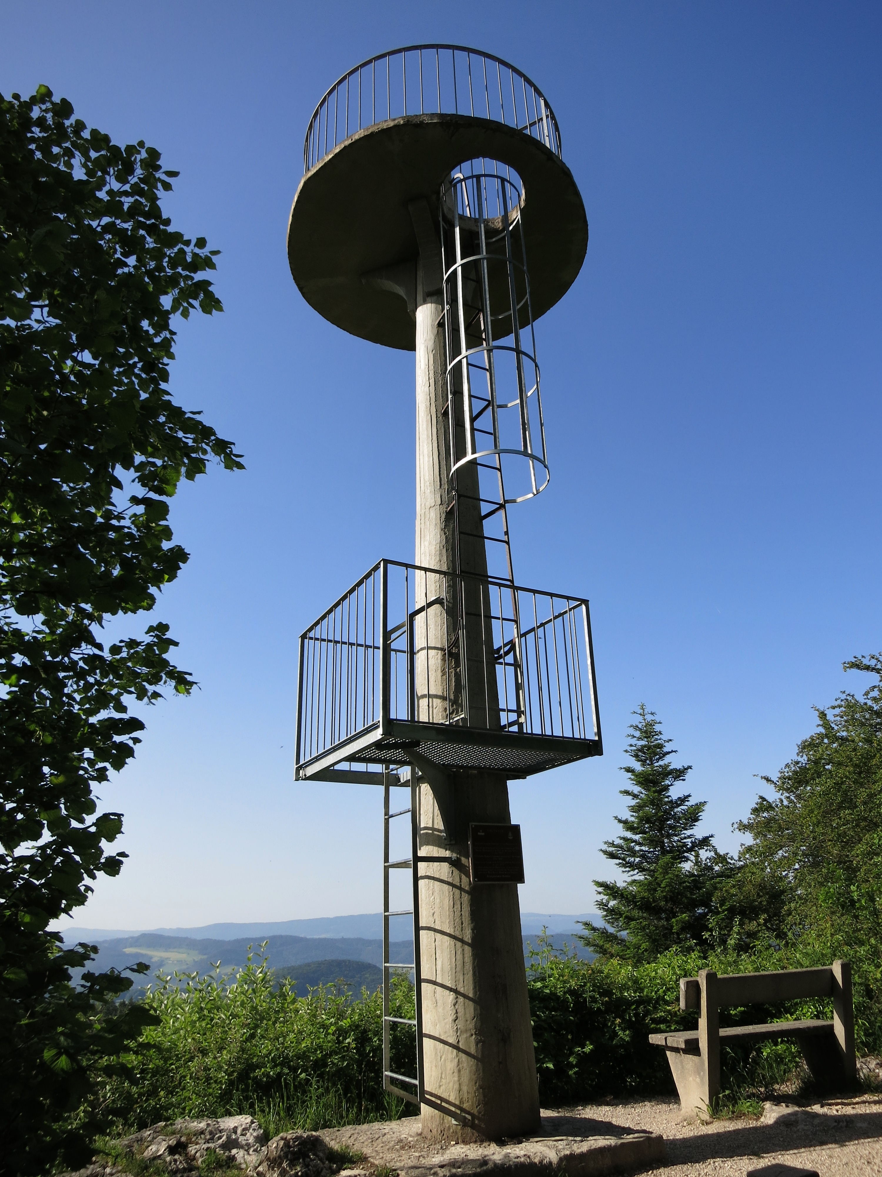 Remelturm